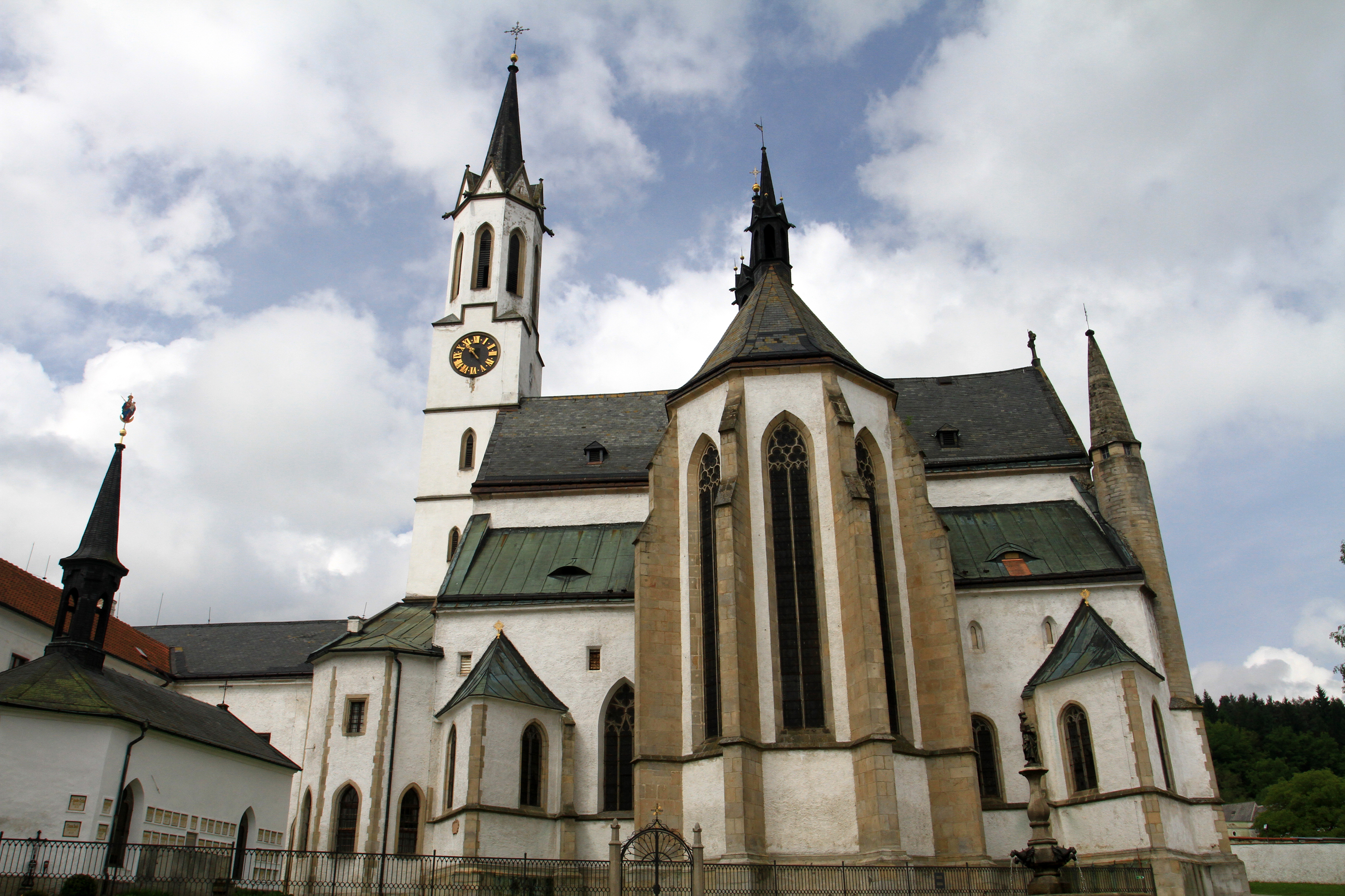 Vyšebrodský klášter: uprostřed hlavní kostel Nanebevzetí Panny Marie, vlevo kaple sv. Anny.